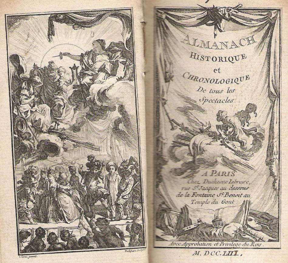 Almanach historique et chronologique de tous les spectacles, Paris 1753 (collection privée)